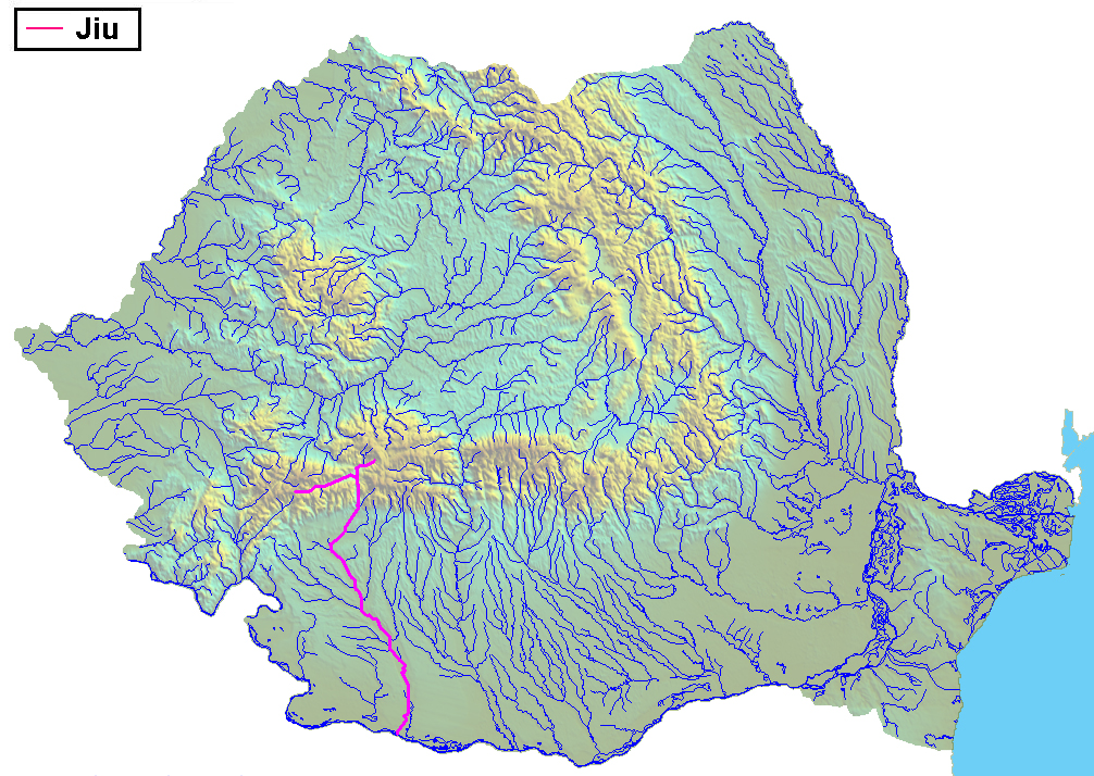 Raul Jiu